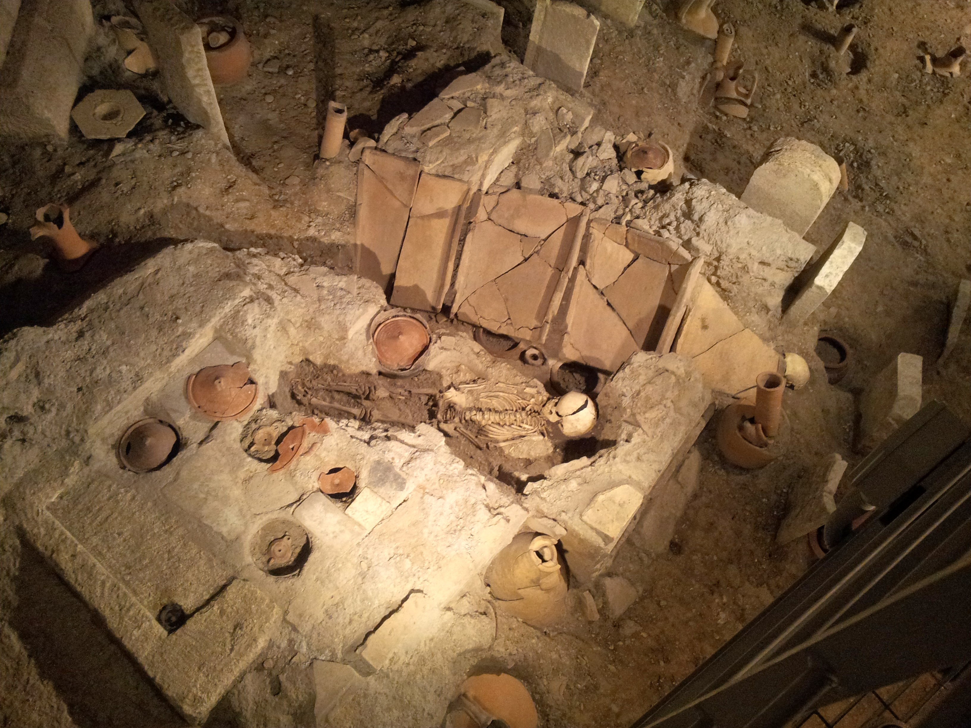 via triumphalis tumba